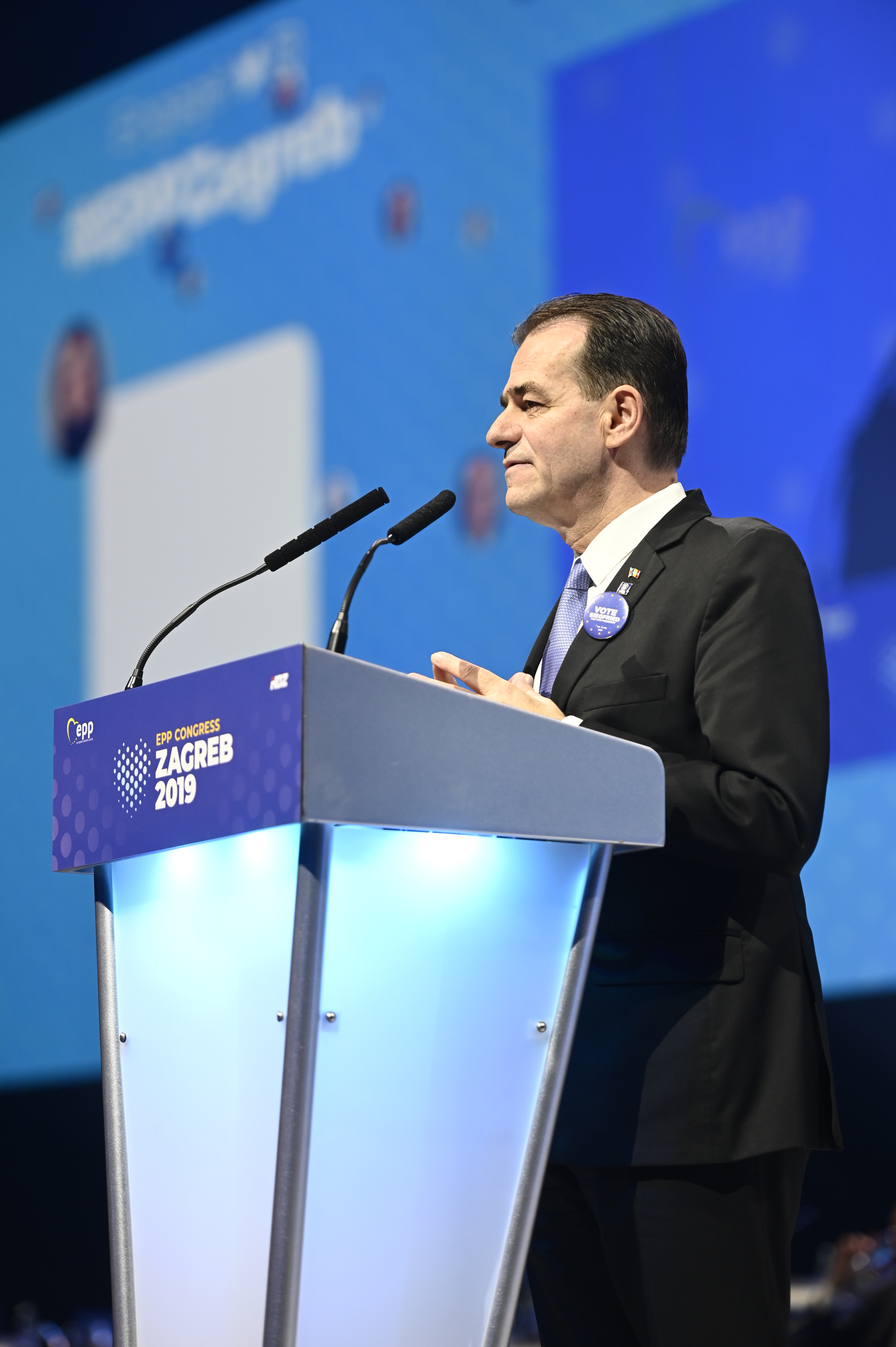 20-21 November 2019